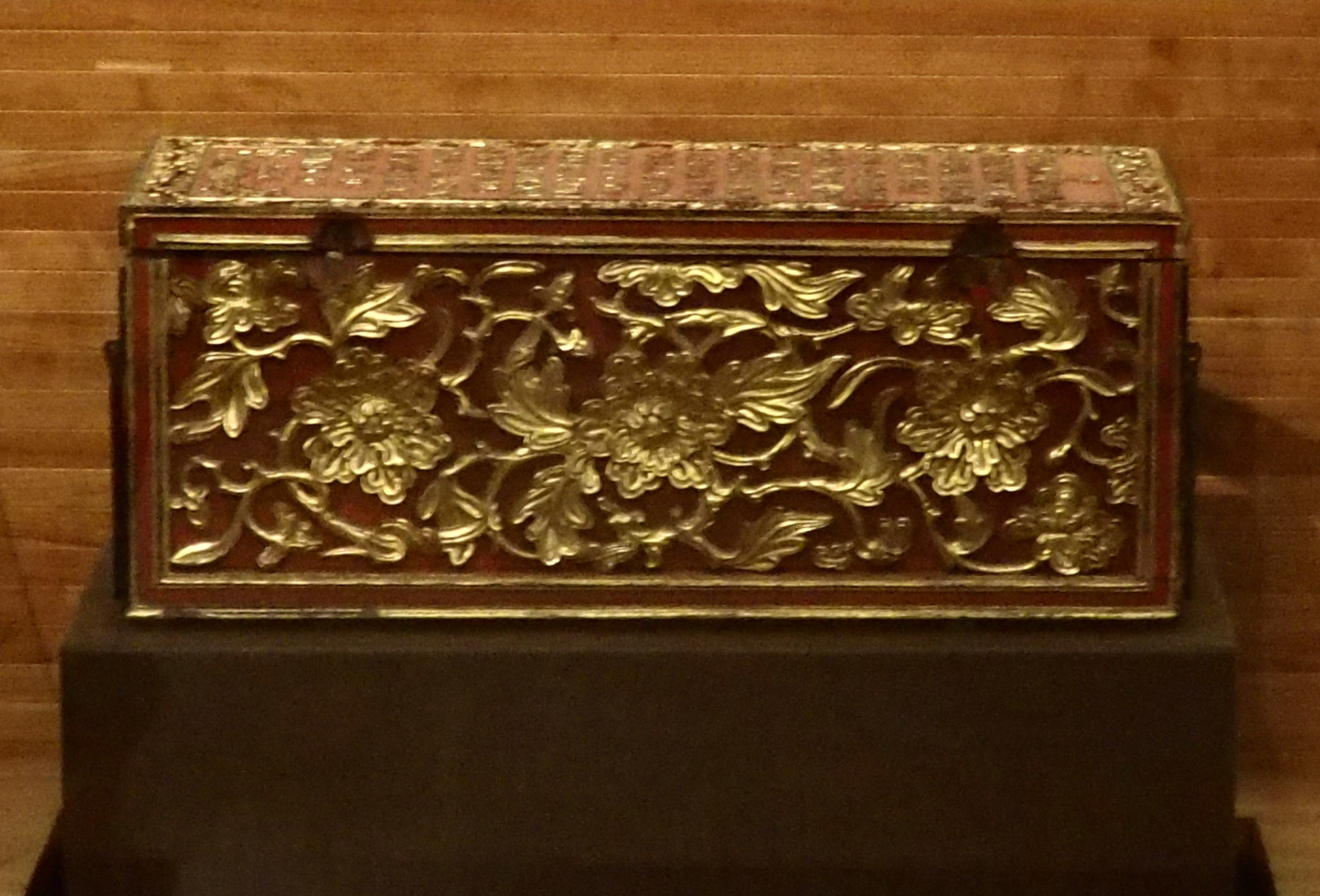 Arca amb relíquies del sant Melchor García Sampedro, a la capella de Covadonga de la catedral d'Oviedo.